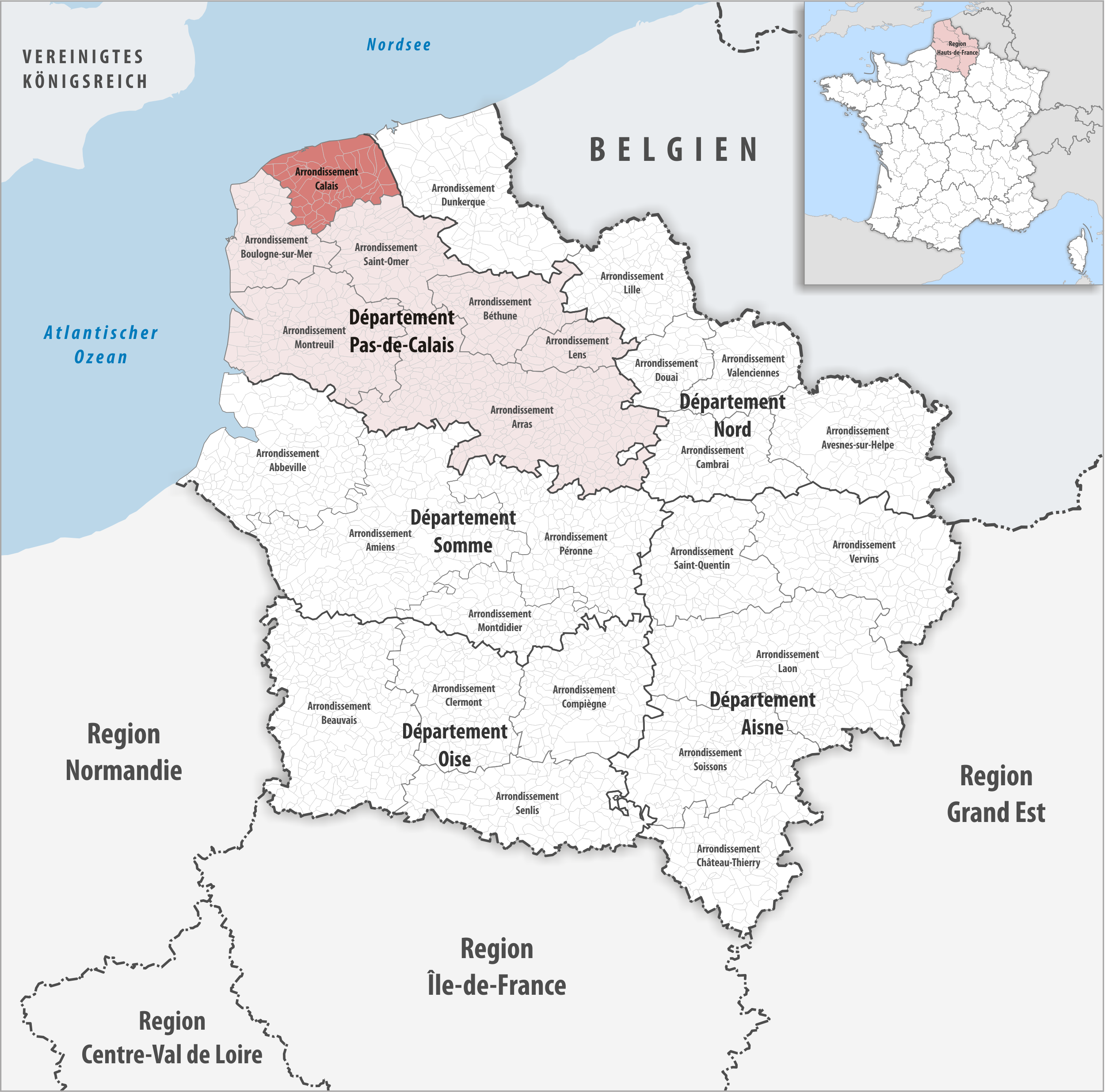 Lage des Arrondissements Calais